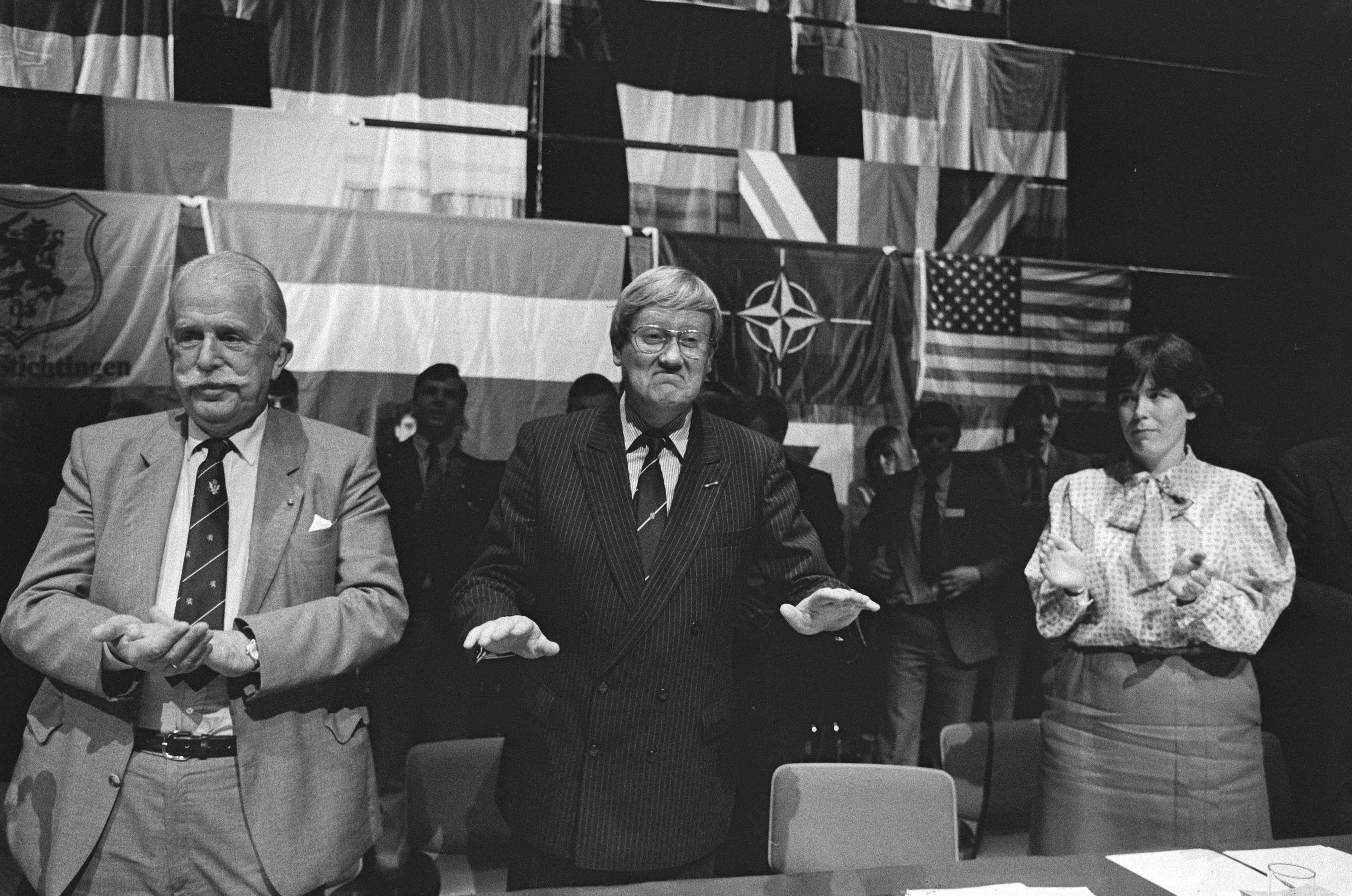 Collectie / Archief : Fotocollectie Anefo Reportage / Serie : [ onbekend ] Beschrijving : Landelijke bijeenkomst OSL in Apeldoorn; CdK in Friesland Wiegel , mr. Baron van Hemert tot Dingshof , rechts Beelarts van blokland Datum : 28 september 1985 Locatie : Apeldoorn, Gelderland Trefwoorden : Ontvangsten, bijeenkomsten, redes Fotograaf : Bogaerts, Rob / Anefo Auteursrechthebbende : Nationaal Archief Materiaalsoort : Negatief (zwart/wit) Nummer archiefinventaris : bekijk toegang 2.24.01.05 Bestanddeelnummer : 933-4380